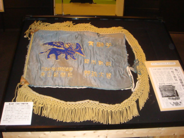 ［［第85回都市対抗野球大会］］開催中の［［野球殿堂博物館］］特別展で撮影（撮影許諾あり）